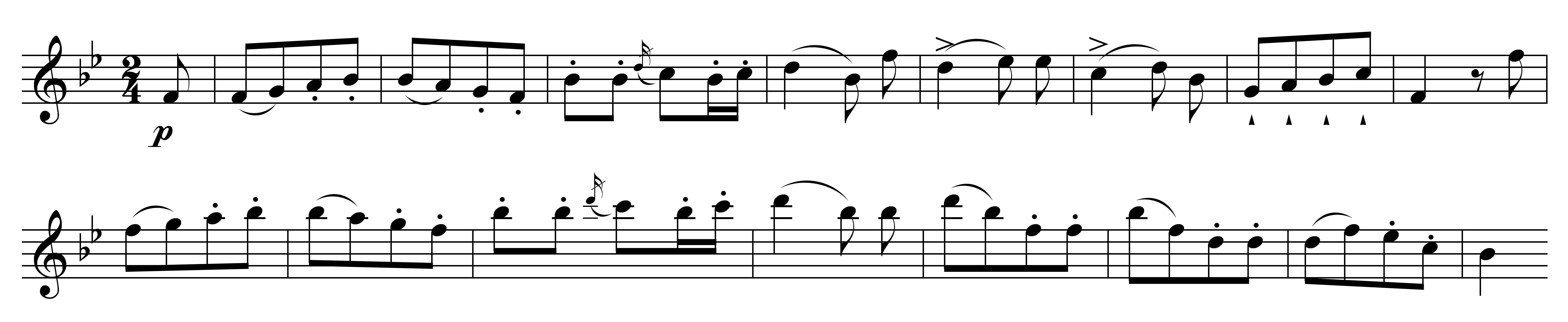 Notenbeispiel Schubert Sinfonie 5 - 4. Satz Hauptthema T. 1-16